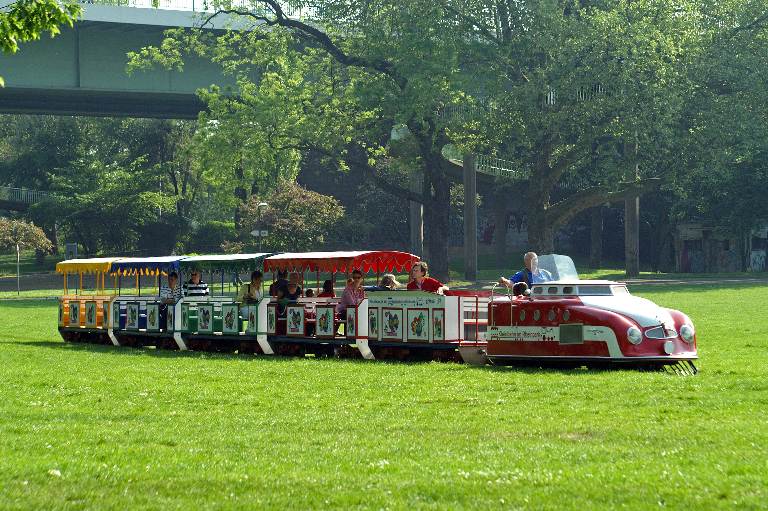 Zug 3 der Kölner Rheinparkbahn mit der Porsche-Lokomotive aus dem Jahr 1959 kommt nur an besucherstarken Tagen zum Einsatz.